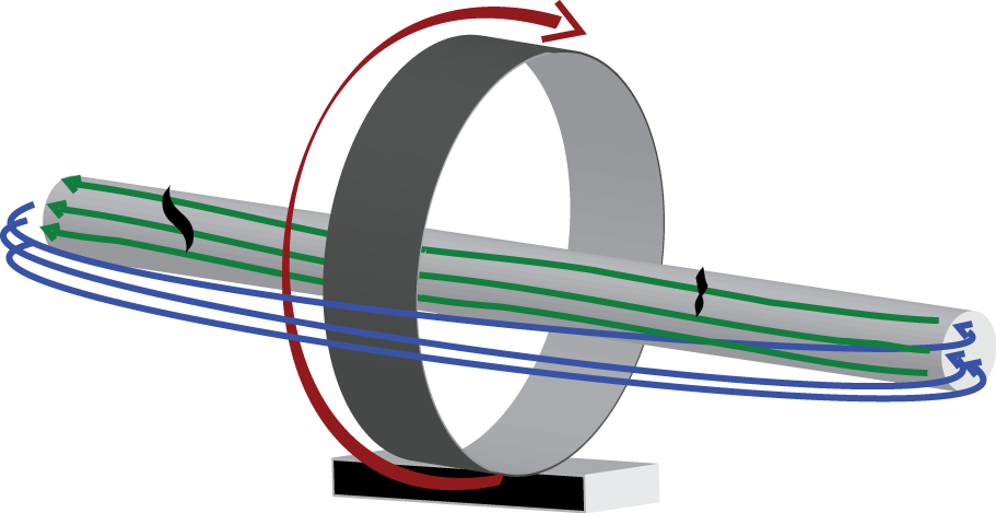 בדיקת מוט במגנוט באמצעות סליל טבעתי: באדום - תנועת הזרם החשמלי; בכחול - השטף המגנטי מחוץ לחלק; בירוק - השטף המגנטי בתוך החלק. בשחור - סדקים אופייניים לגילוי באמצעות שיטה זו